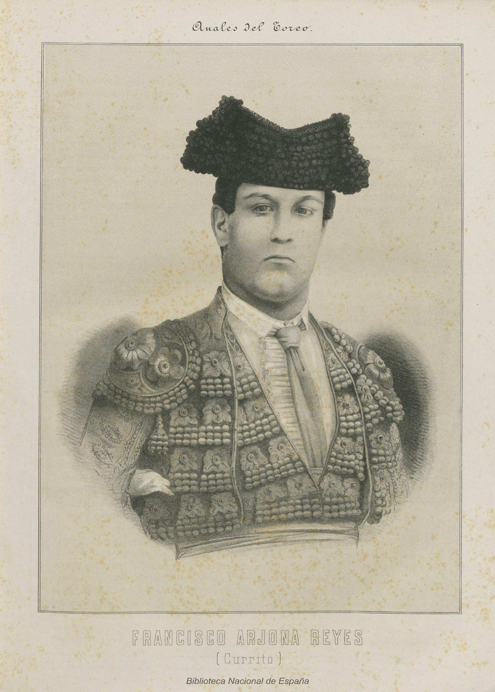 Francisco Arjona Reyes, Currito, litografía; ilustración de Anales del toreo : reseña histórica de la lidia de reses bravas : galería biográfica de los principales lidiadores: razón de las primeras ganaderías españolas, sus condiciones y divisas obra escrita por José Velázquez y Sánchez; e ilustrada por reputados artistas, Madrid, 1888.